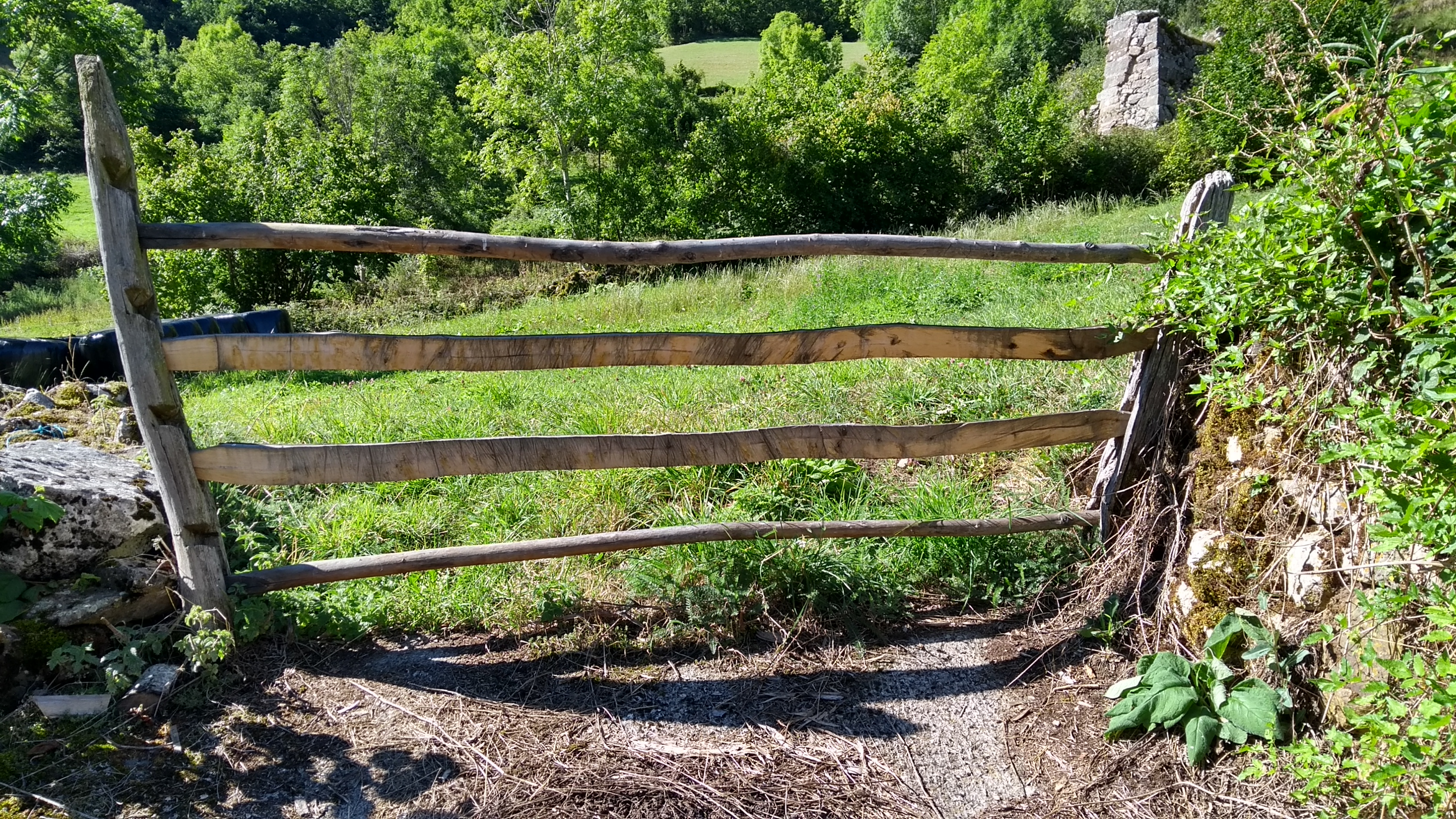 cerramiento de piedras para el ganado